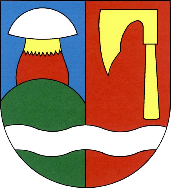 Znak obce Vršovice